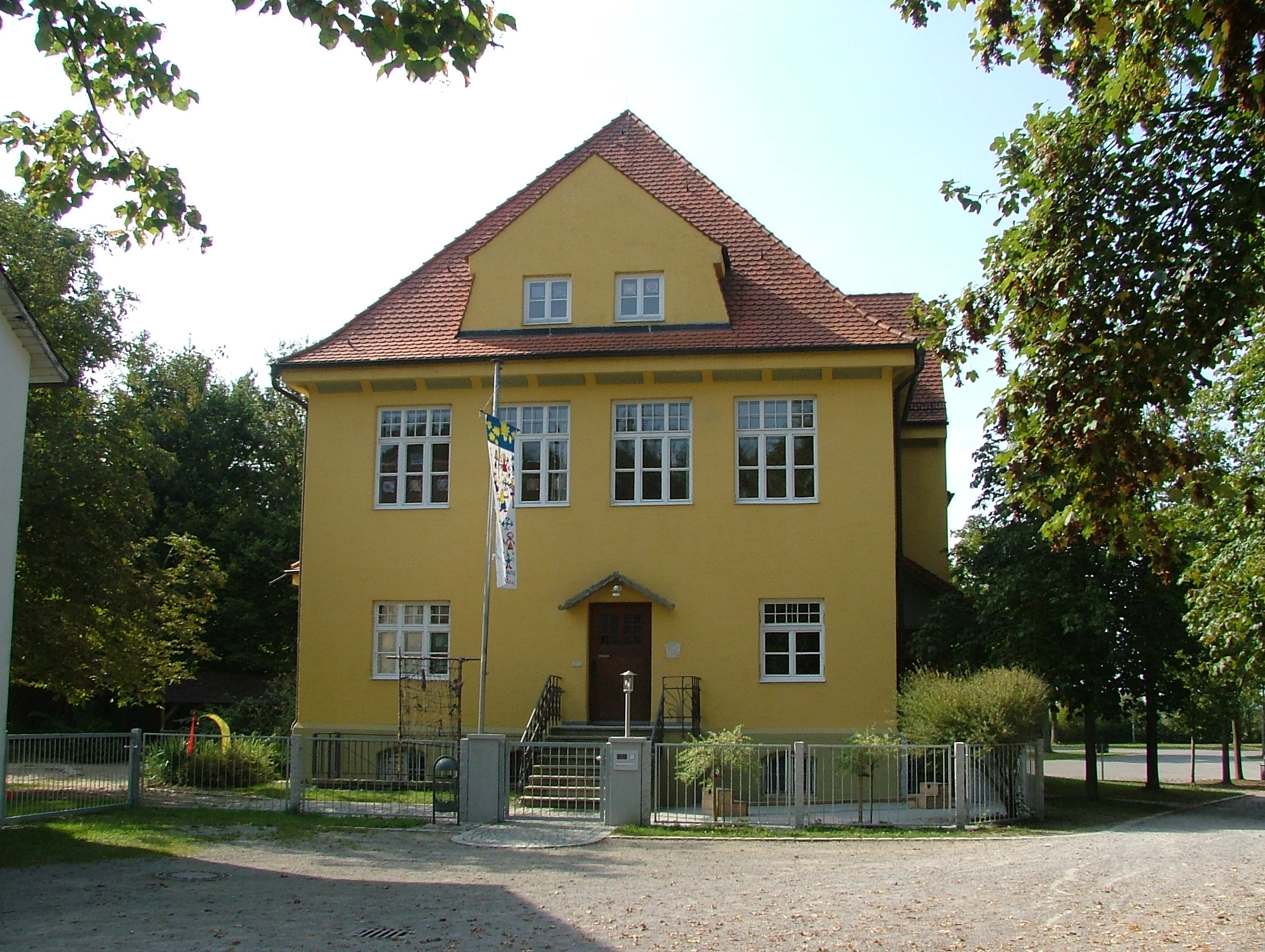 Schule